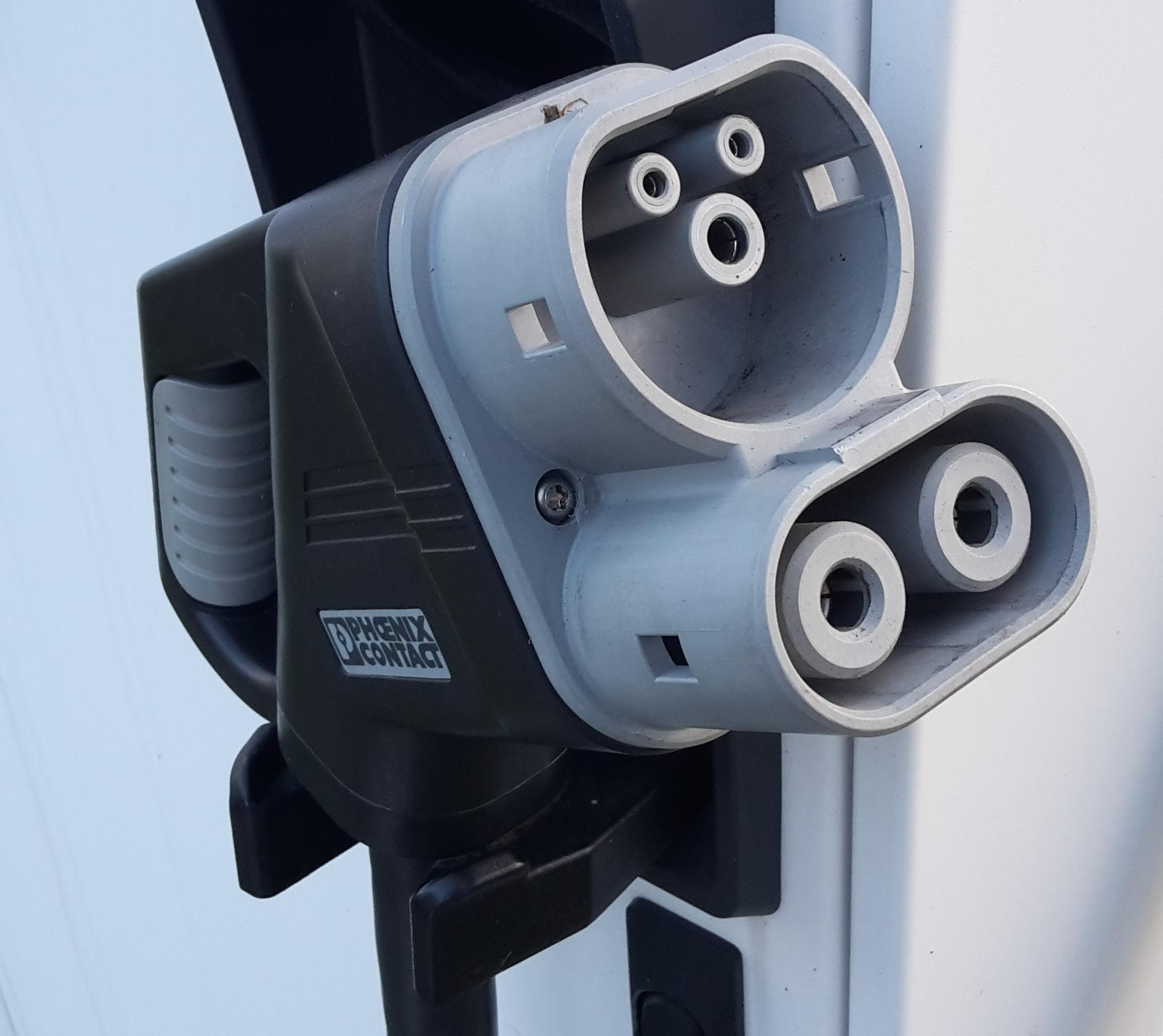 50 kW-CCS-Stecker an einer Ladesäule in Magdeburg/Deutschland, Combined Charging System, Hersteller: Phoenix Contact